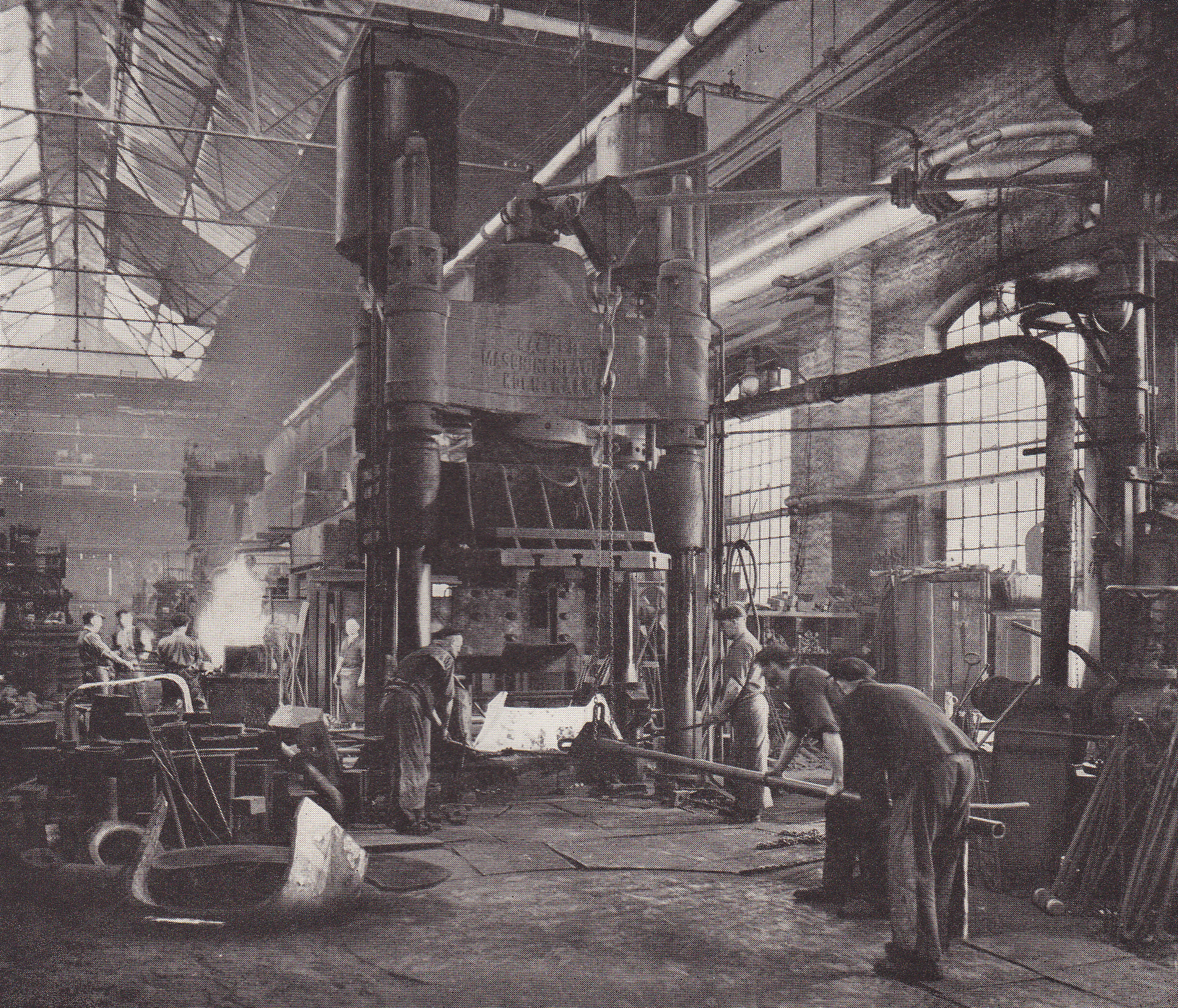 Kümpelpresse im Salbker Werk der Maschinenfabrik Buckau R. Wolf